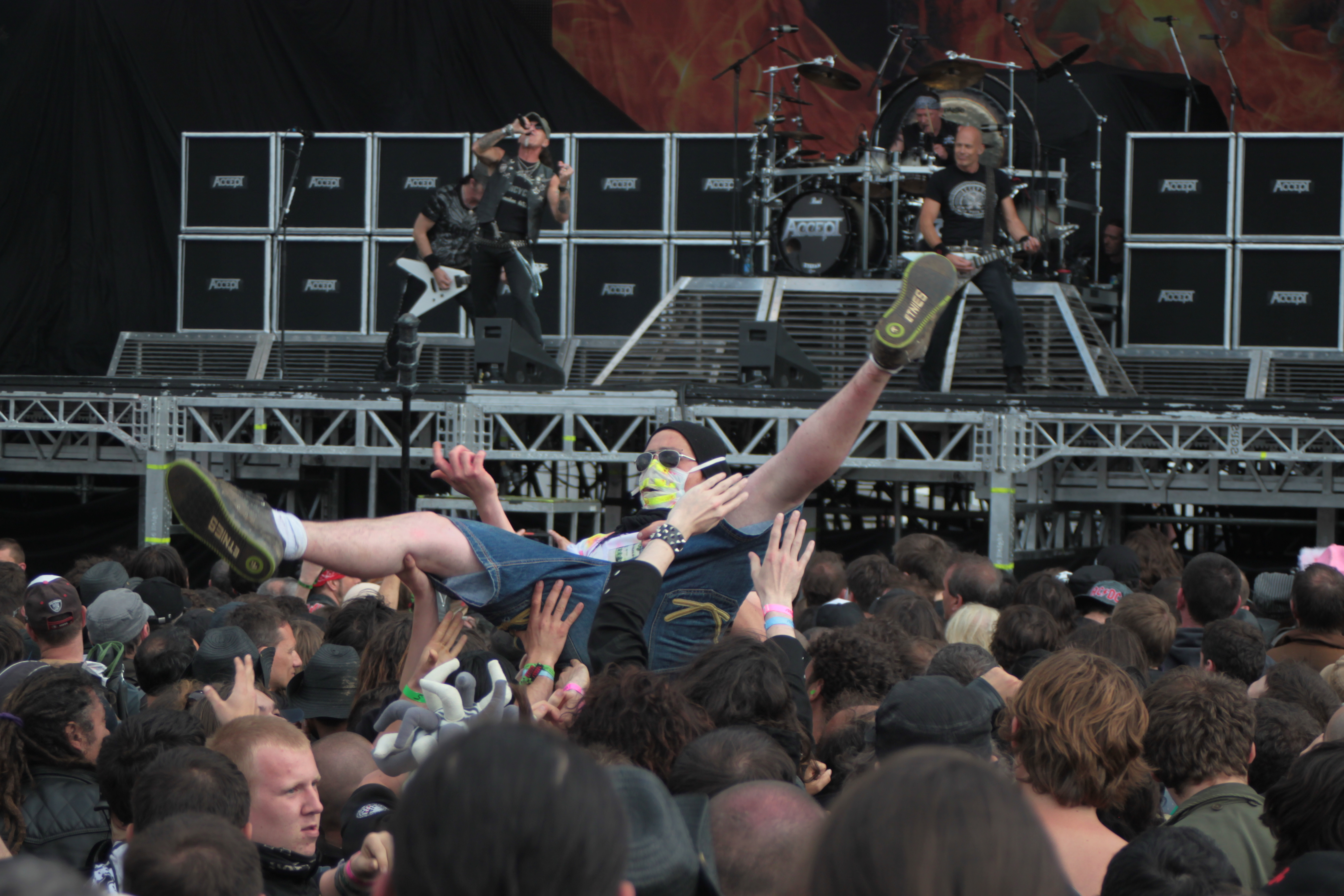 Slam pendant le concert d'Accept, Helfest 2013, Fr-44-Clisson.